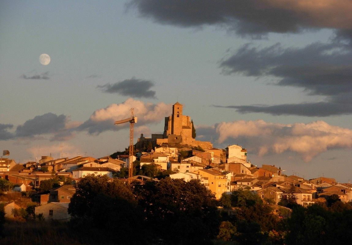 vista parcial de Benavarri(Baixa Ribagorça) Huesca